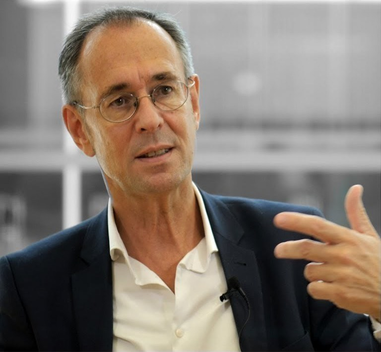 Woher kommen die ganzen Fake News, die in den sozialen Netzwerken unkritische Naturen verunsichern? Andreas Zick, Direktor des Instituts für ...